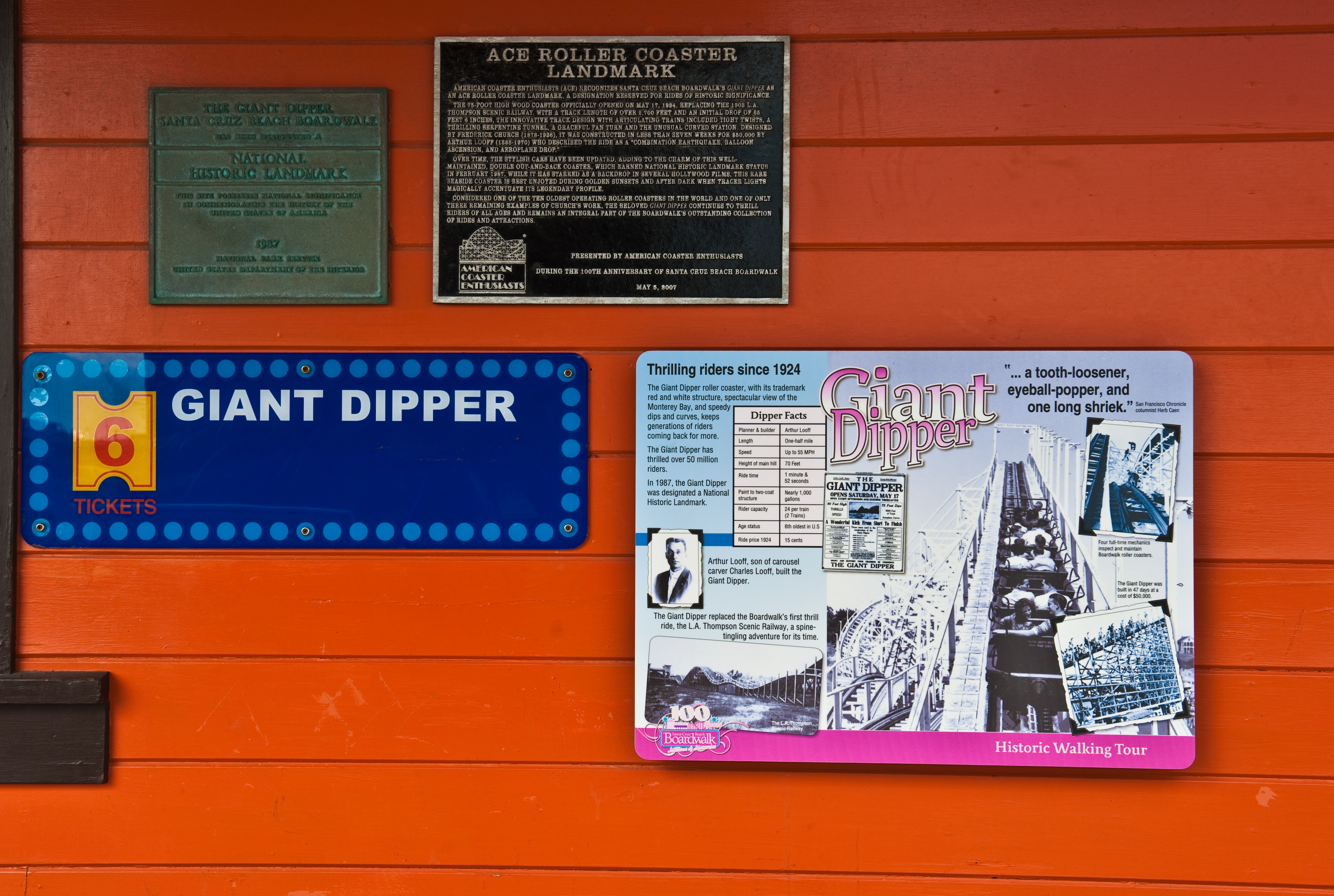 Giant Dipper